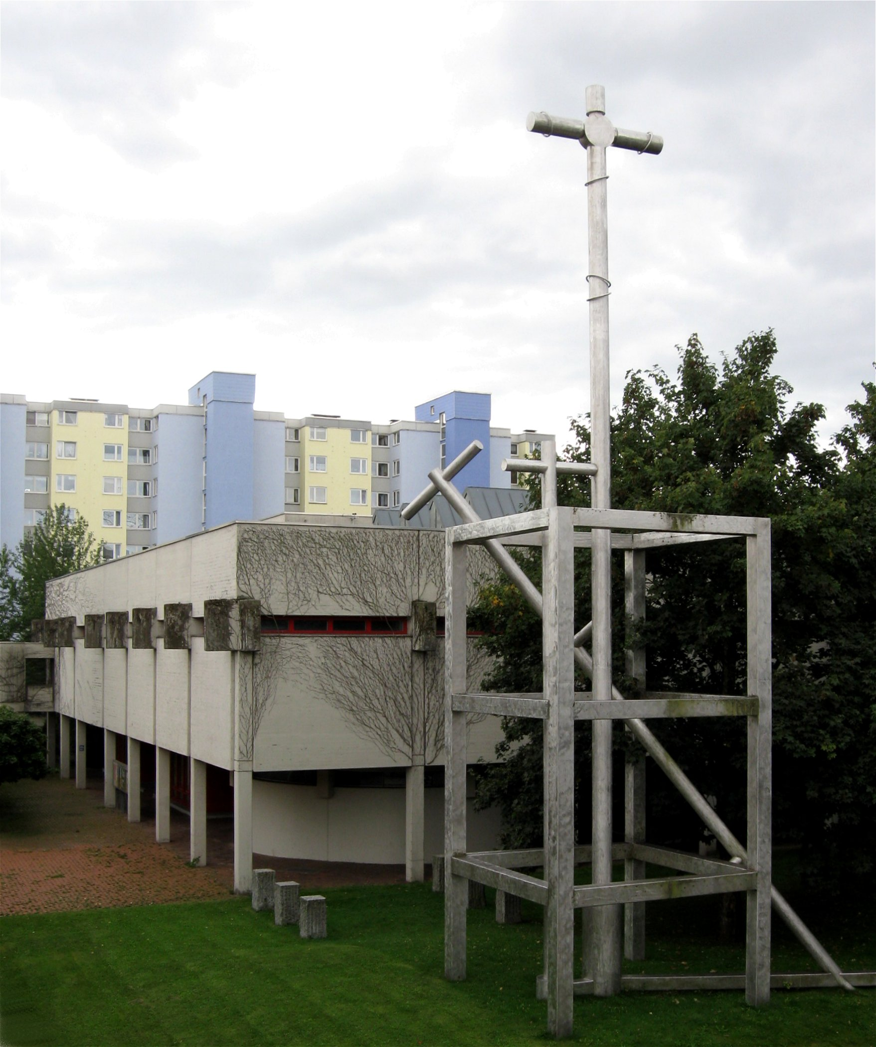 Kath. Kirche St. Jakobus, München-Neuperlach, Quiddestr.; mit Skulptur "Kreuzgerüst" von Karl Jakob Schwalbach von 1998